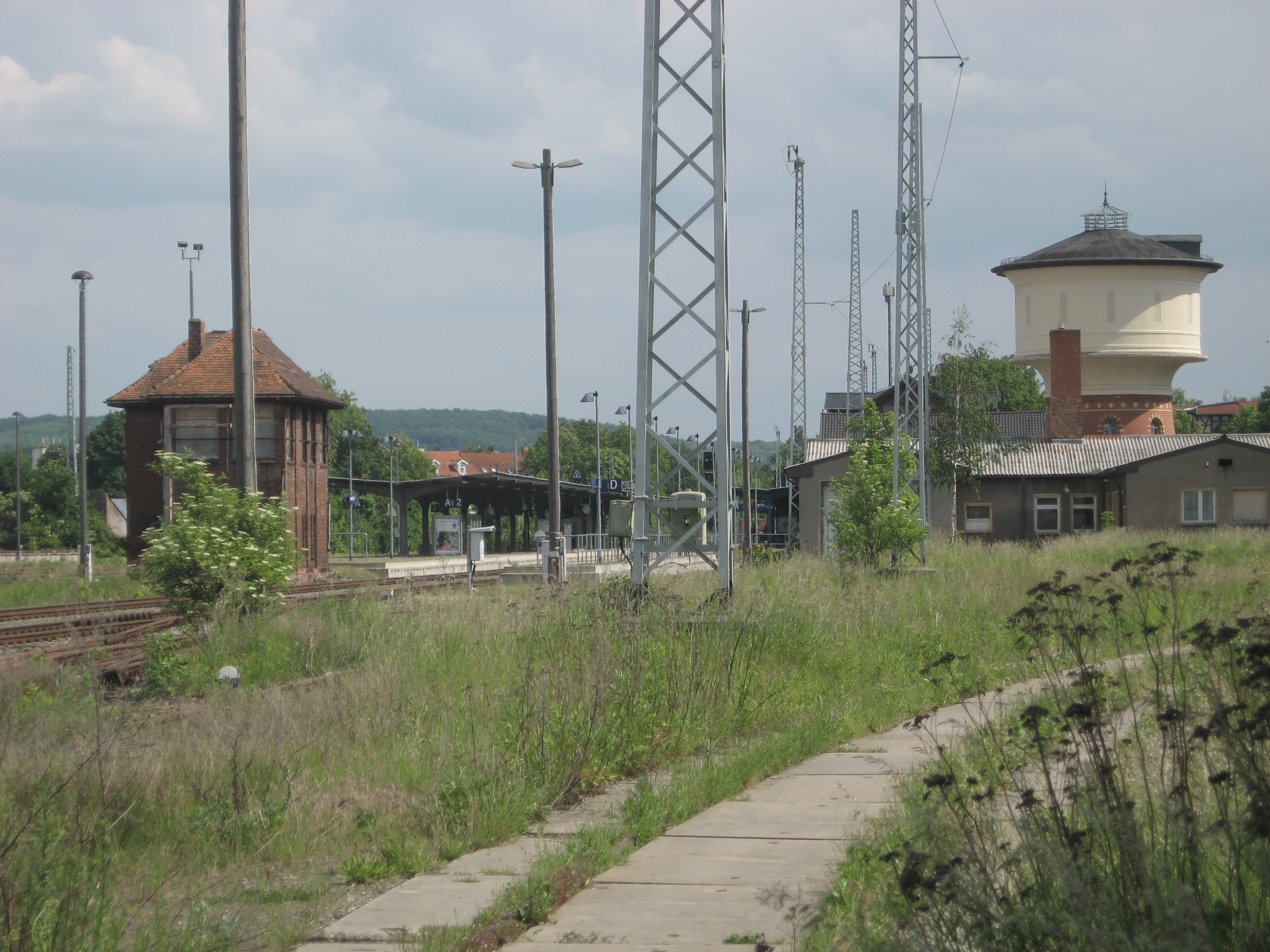 Hauptbahnhof Arnstadt